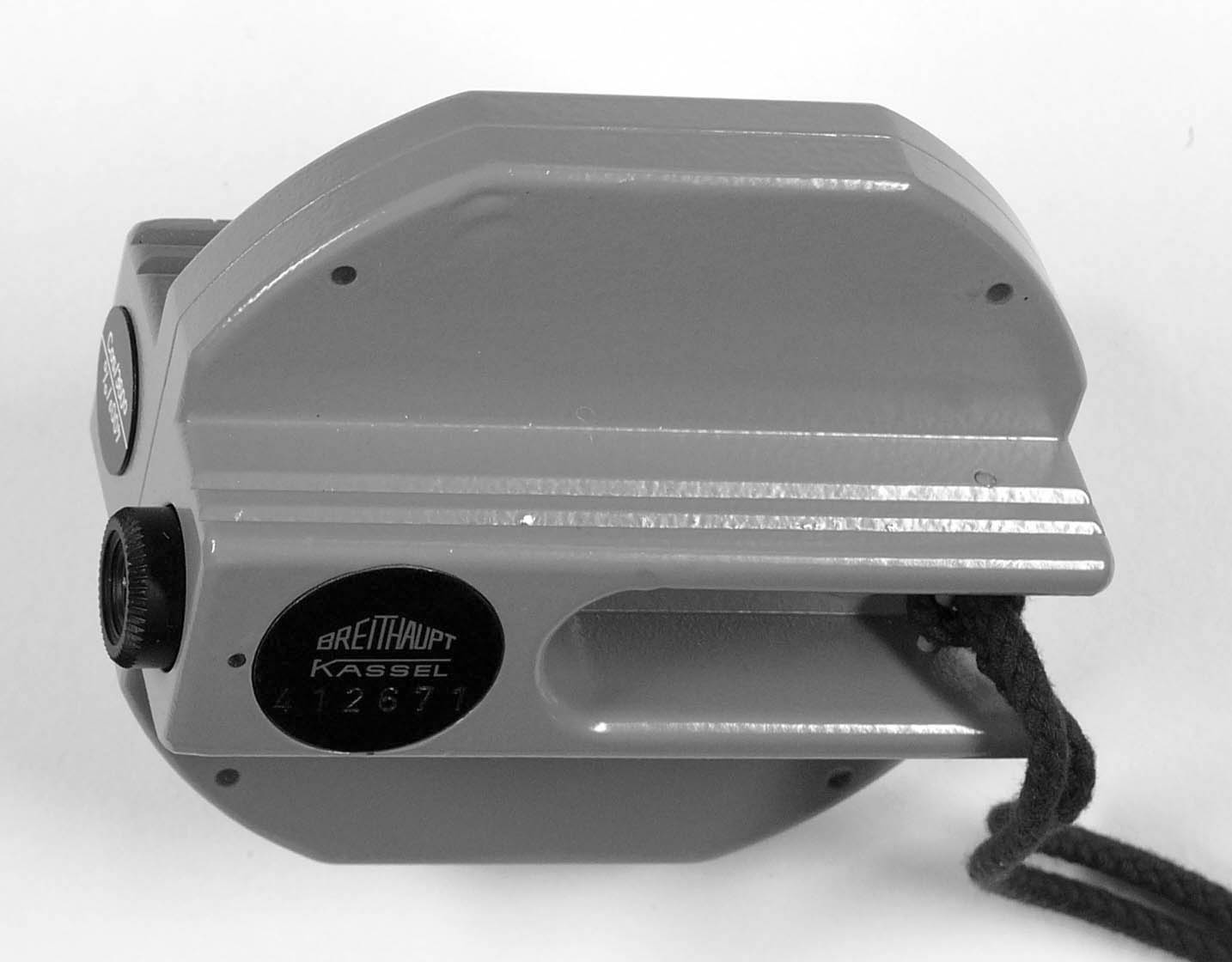 Leveller